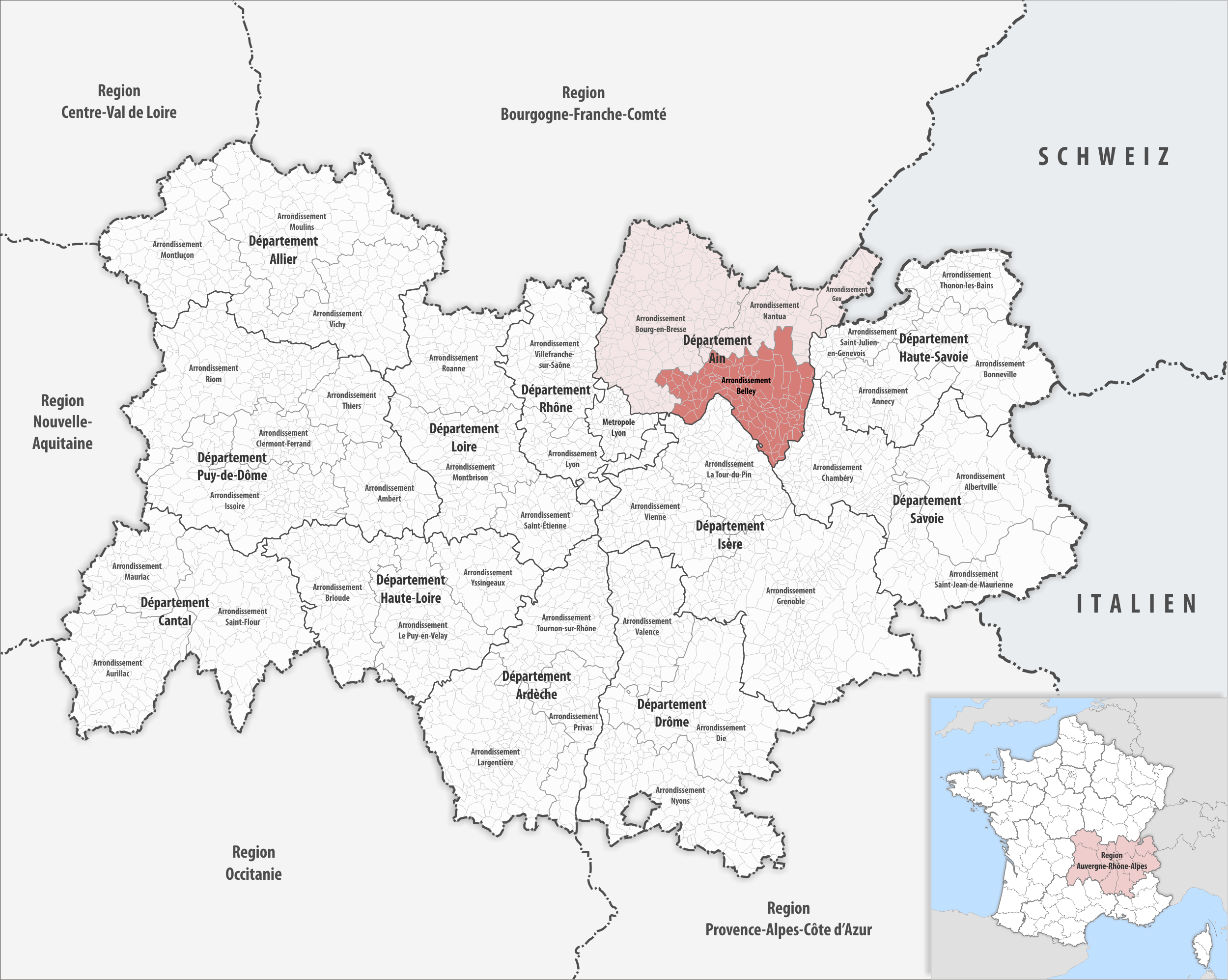 Lage des Arrondissements Belley